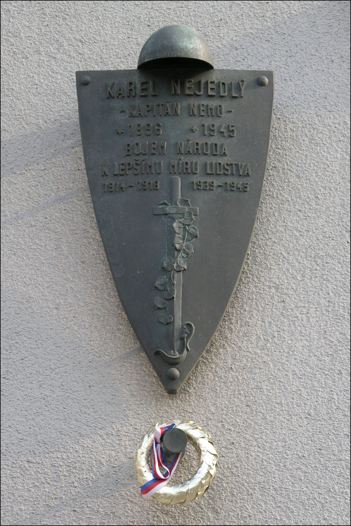 Pamětní deska Karla Nejedlého v Čínské ulici - Praha, Dejvice